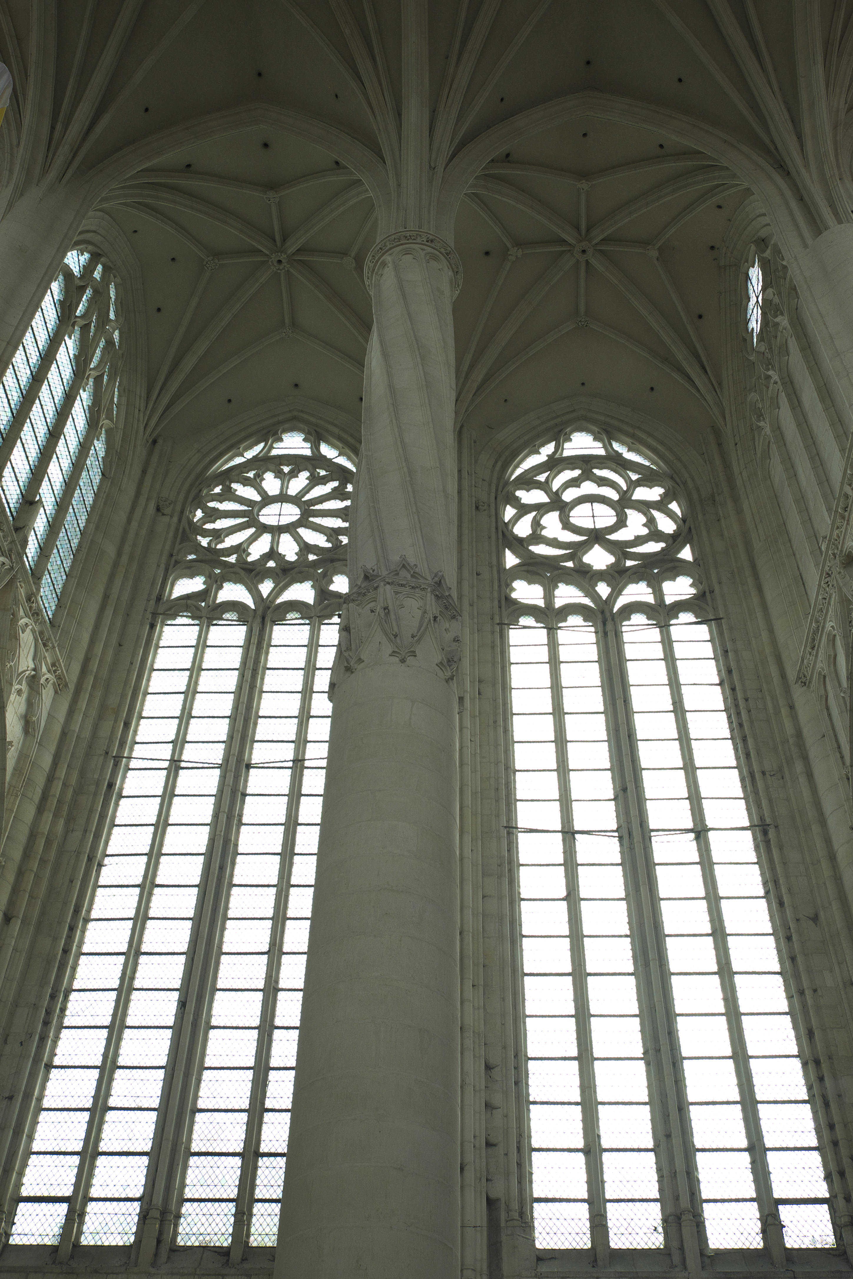 Fenster in der Basilika Saint-Nicolas in Saint-Nicolas-de-Port im Département Meurthe-et-Moselle (Lothringen/Frankreich)